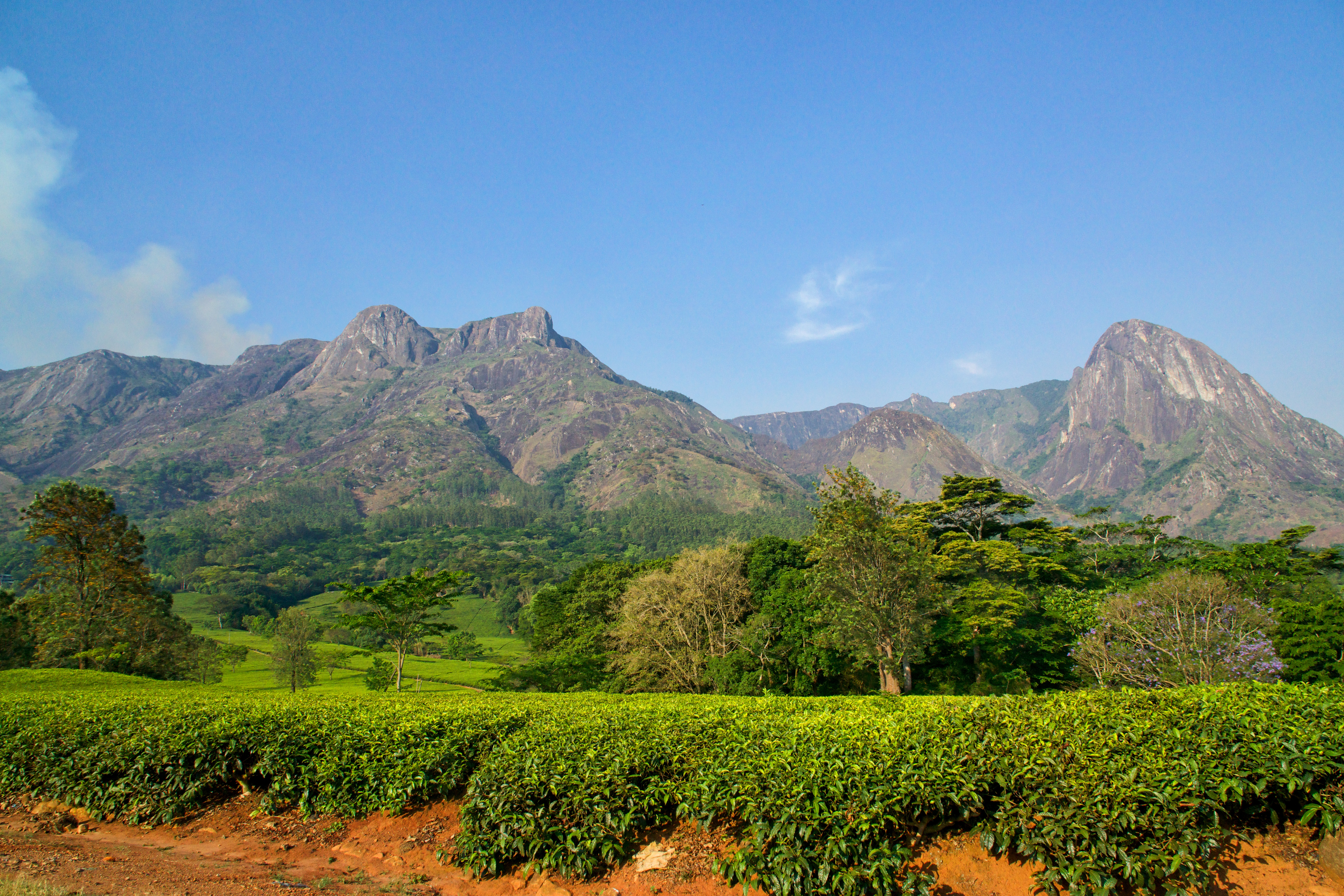 Mount Mulanje